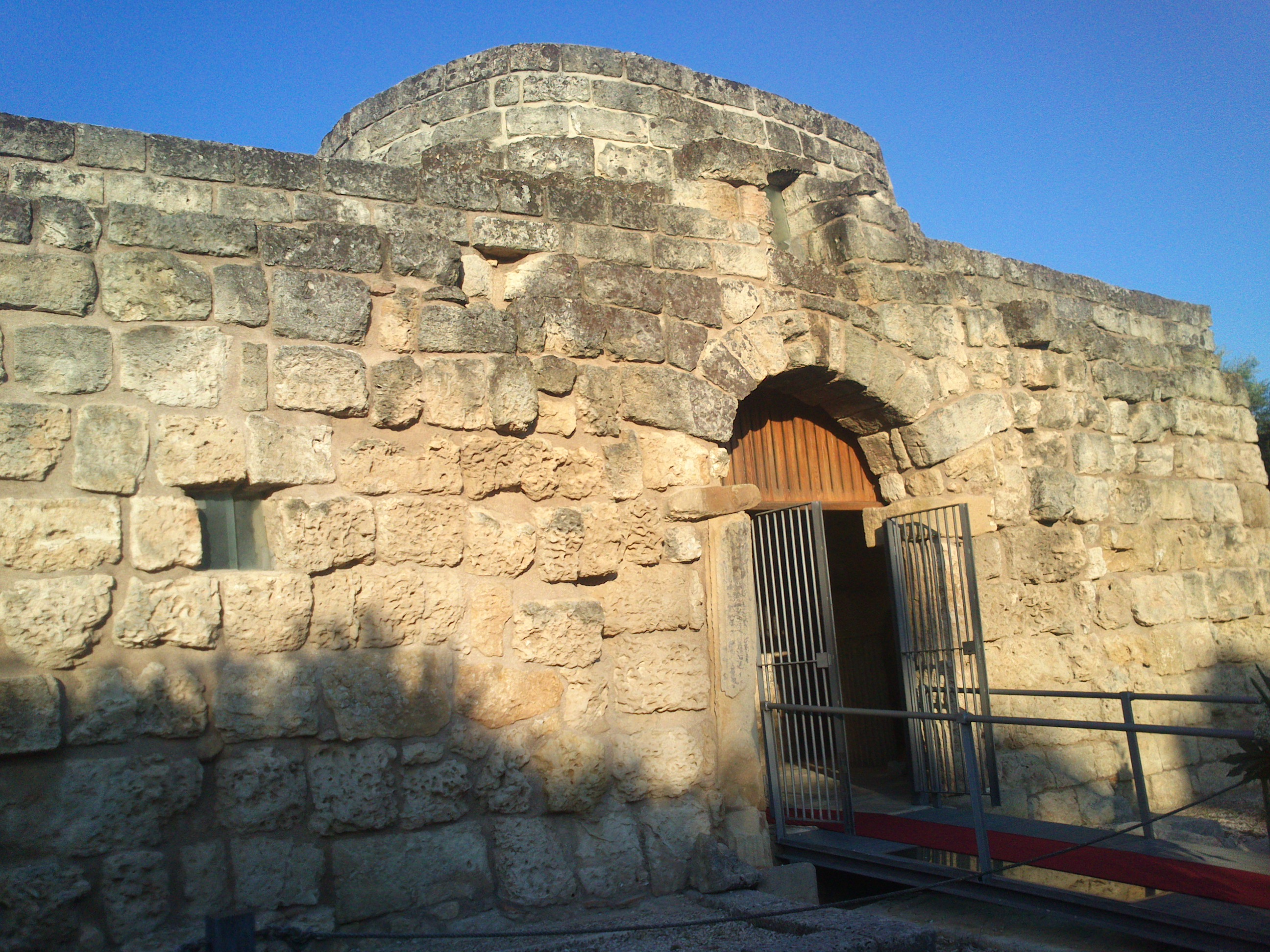 Chiesa di San Pietro a Crepacore a Torre Santa Susanna (BR)